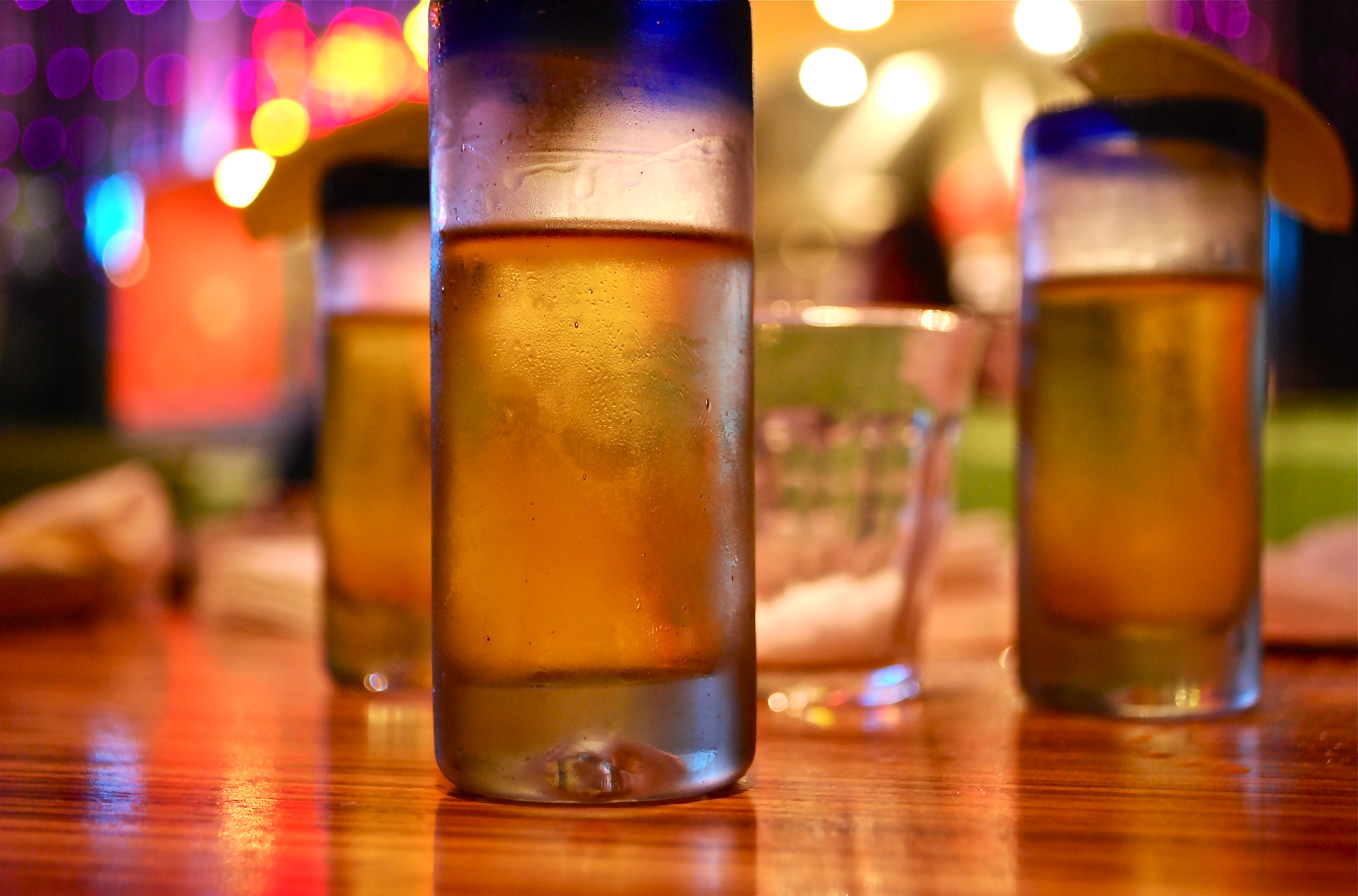 Partaaaay has been happening :)